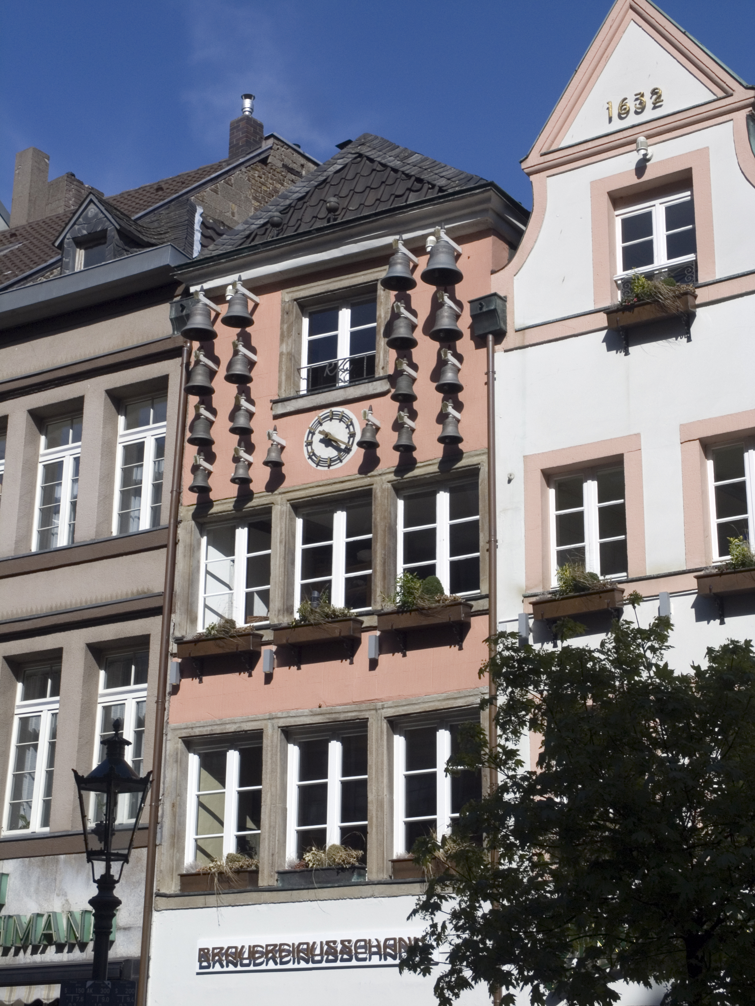 Северный Рейн - Вестфалия, Дюссельдорф - House Marktstraße 12 (with bells) in Düsseldorf-Altstadt